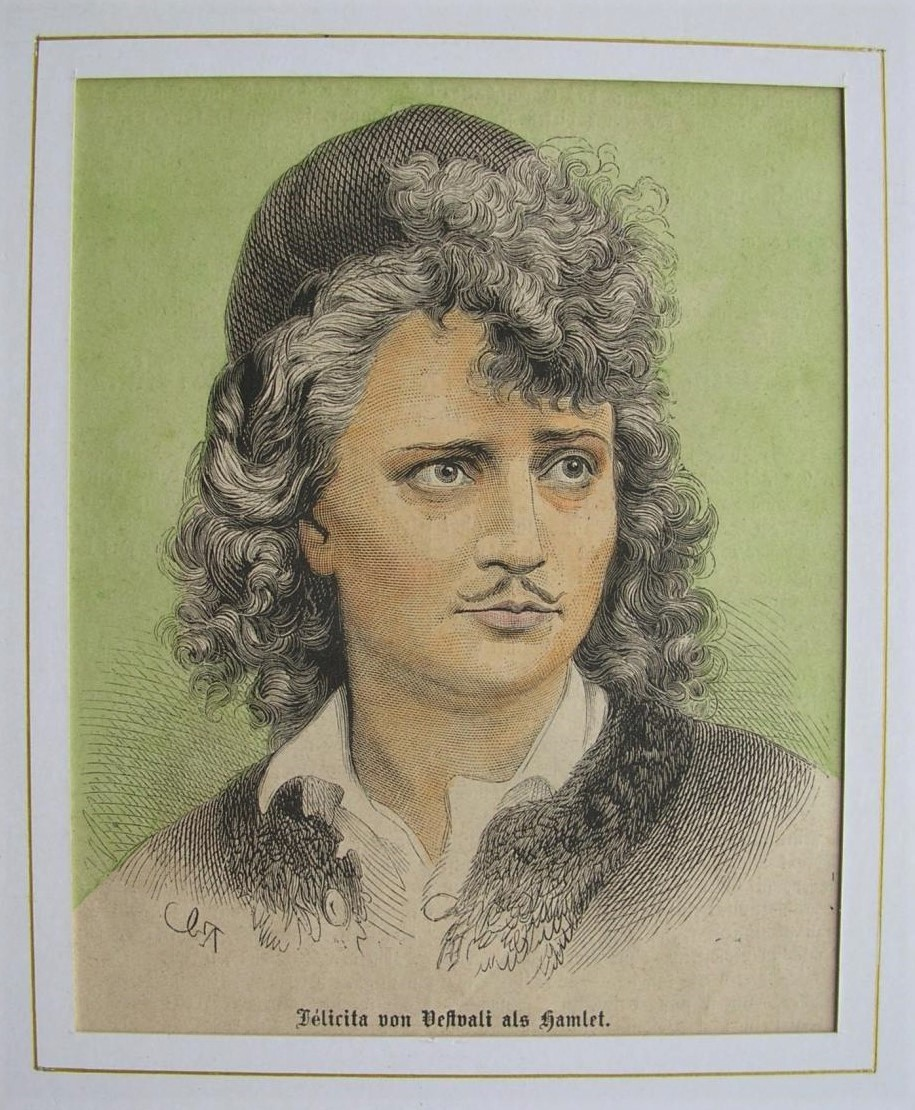 Felicita von Vestvali als Hamlet, 1873, teilkolorierter Holzstich, 13 x 11 cm